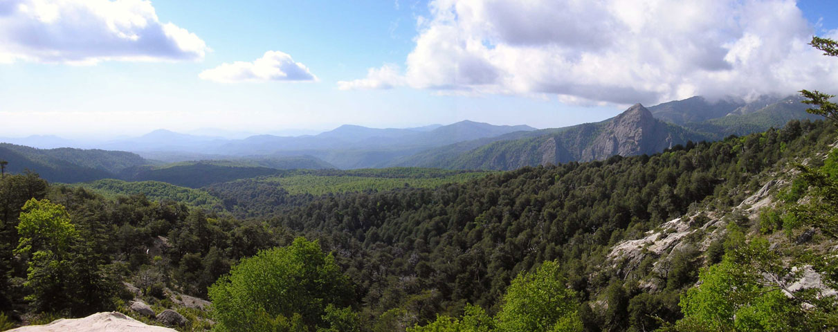 Panorama von Vilches Nationalpark in Chile